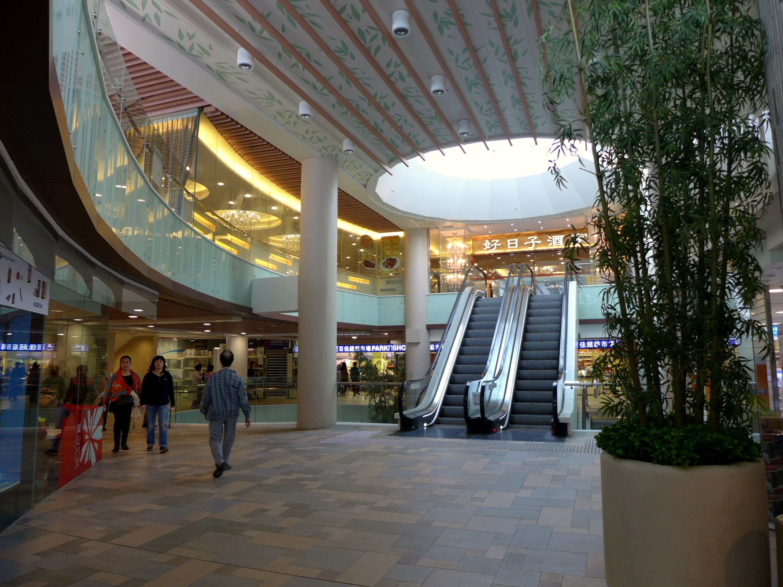 Chuk Yuen Plaza